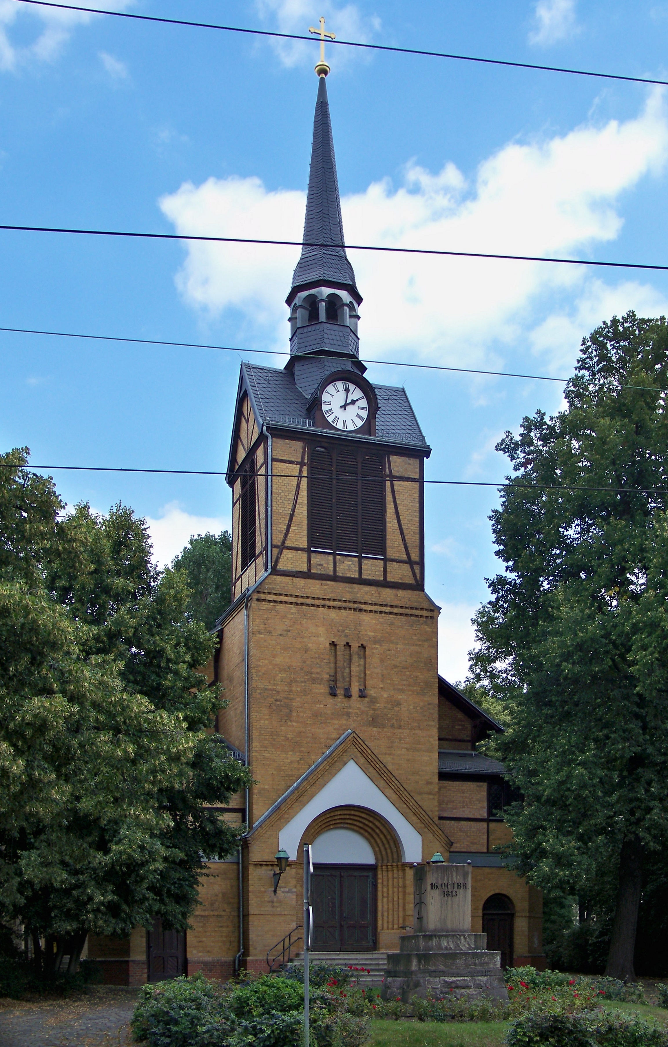 Kirche in Leipzig-Möckern